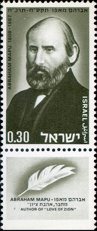 בול אברהם מאפו